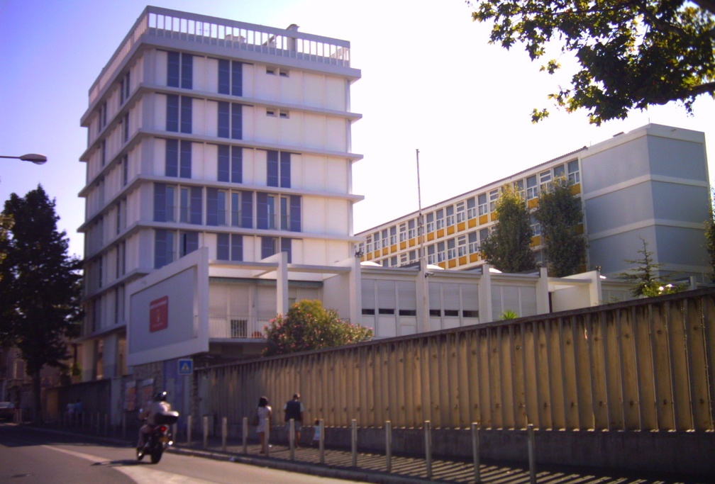 Une vue du lycée Marcel-Pagnol à Saint-Loup (Marseille, 11e arr.)